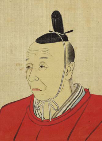 羽太安芸守正養肖像『近世名家肖像』より